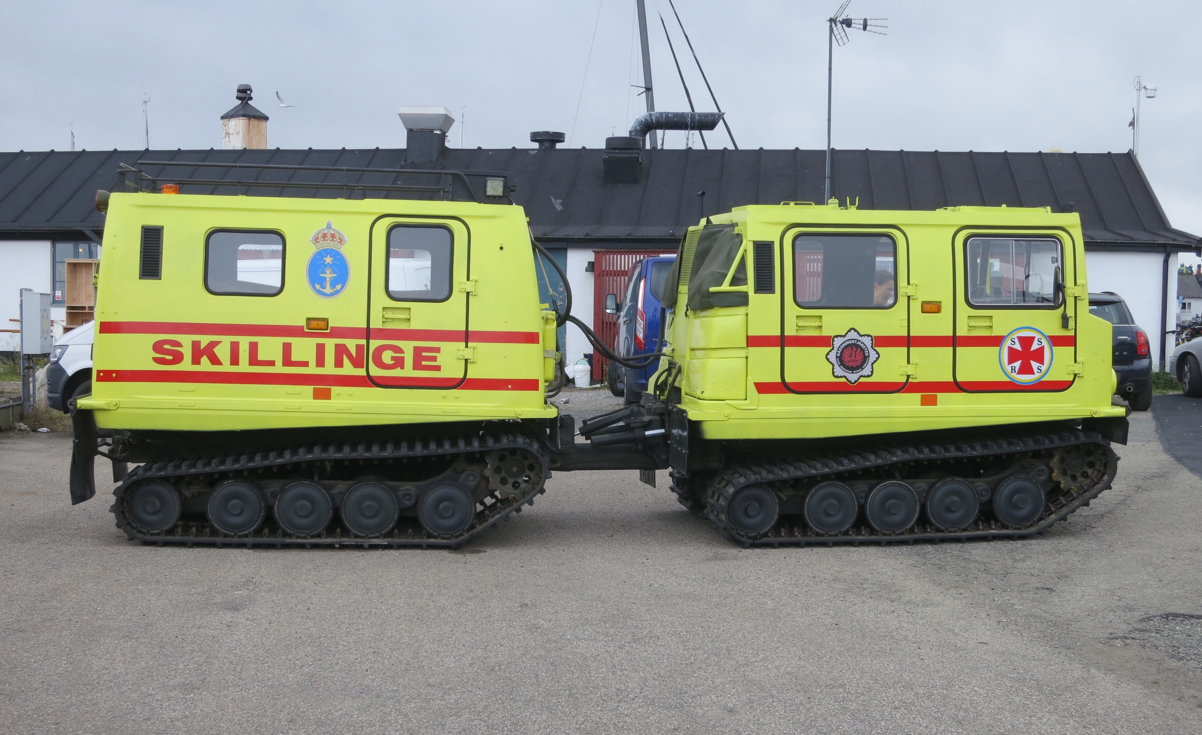 Hägglunds Bv206 hos SSRS Skillinge